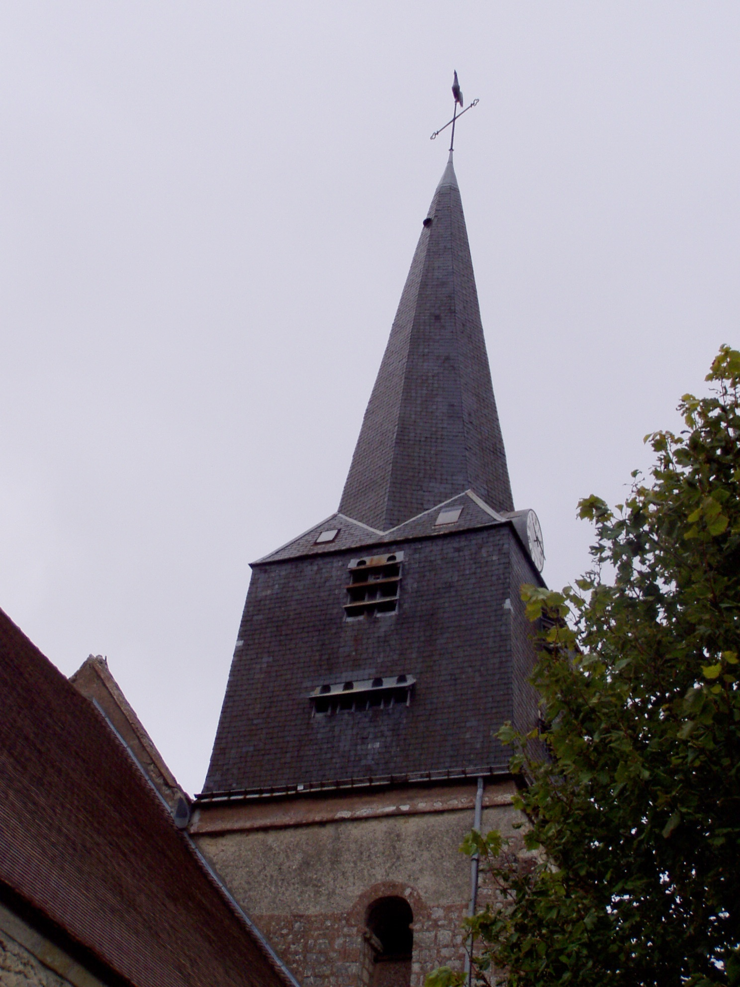 Photographie du clocher tors de l'église de Boësses dans le Loiret prise par Accrochoc le 04 septembre 2006